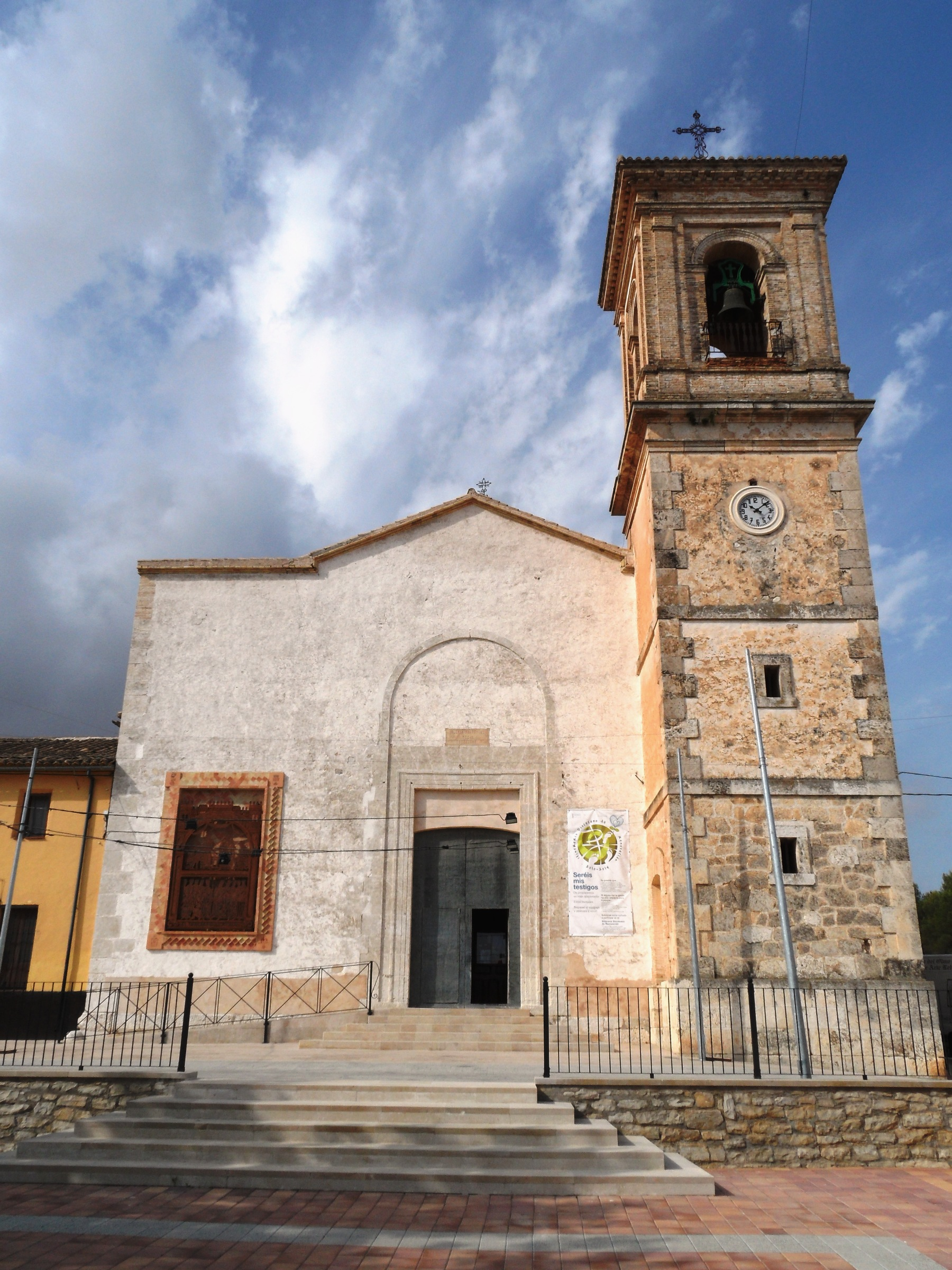 Església de San Bartomeu.